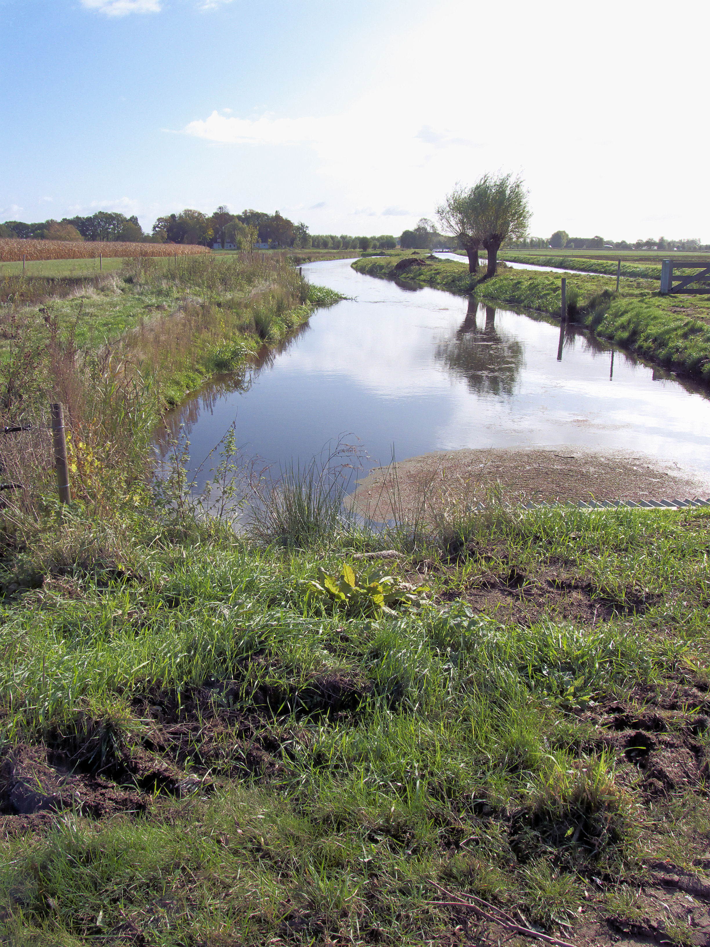 Kilsdonkse molen, Dinther, omleiding van de Aa vanaf de stuw